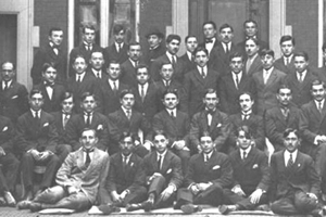 Les étudiants azerbaïdjanais étudiant à Paris en 1920